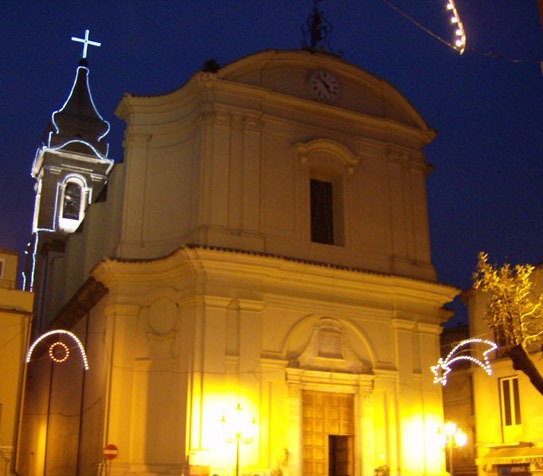 Chise santa maria degli angeli.